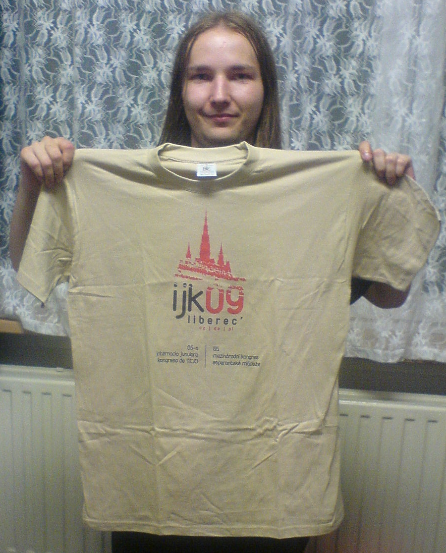 Łukasz Żebrowski tenanta t-ĉemizon kun la oficiala emblemo de la 65-a IJK.